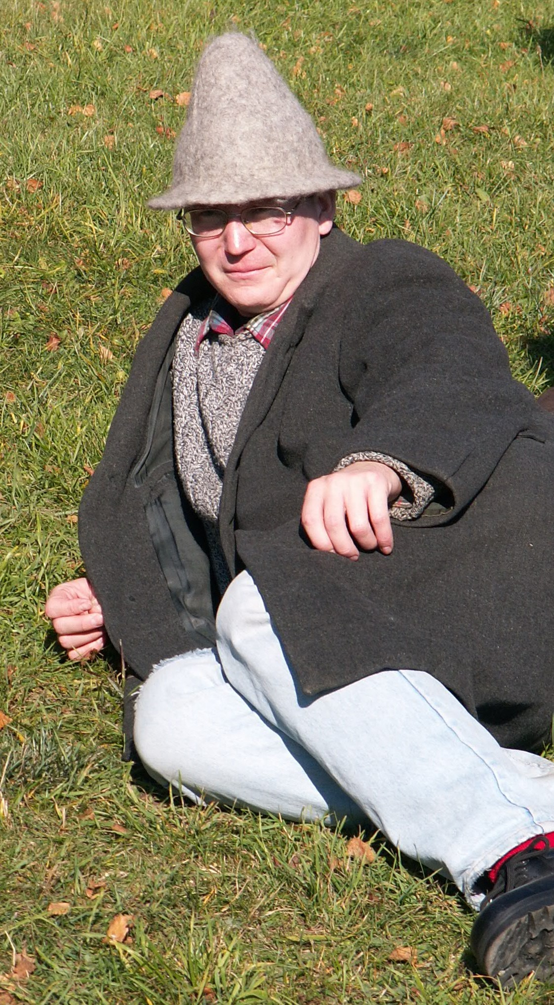 Andrus Kiis aastal 2005 TÜ ajalooringi sügisreisil endavalmistatud viltkaabu e törlöndiga.